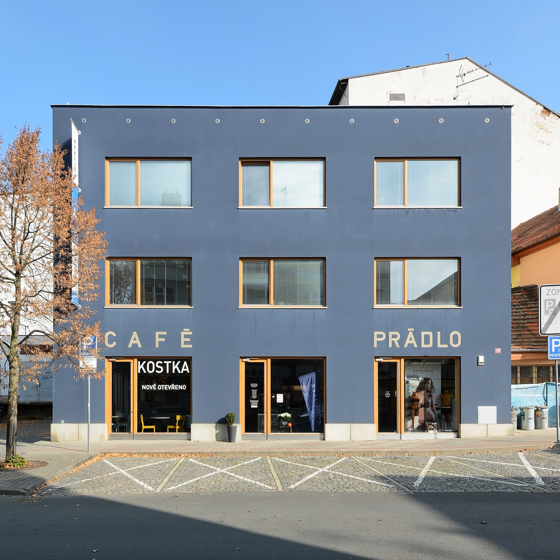 "Modrý dům", objekt čp. 2131, Vnoučkova ulice, Benešov u Prahy. Architekti: Markéta Cajthamlová, Šárka Holišová Šochová, projekt: 1999, realizace 2001